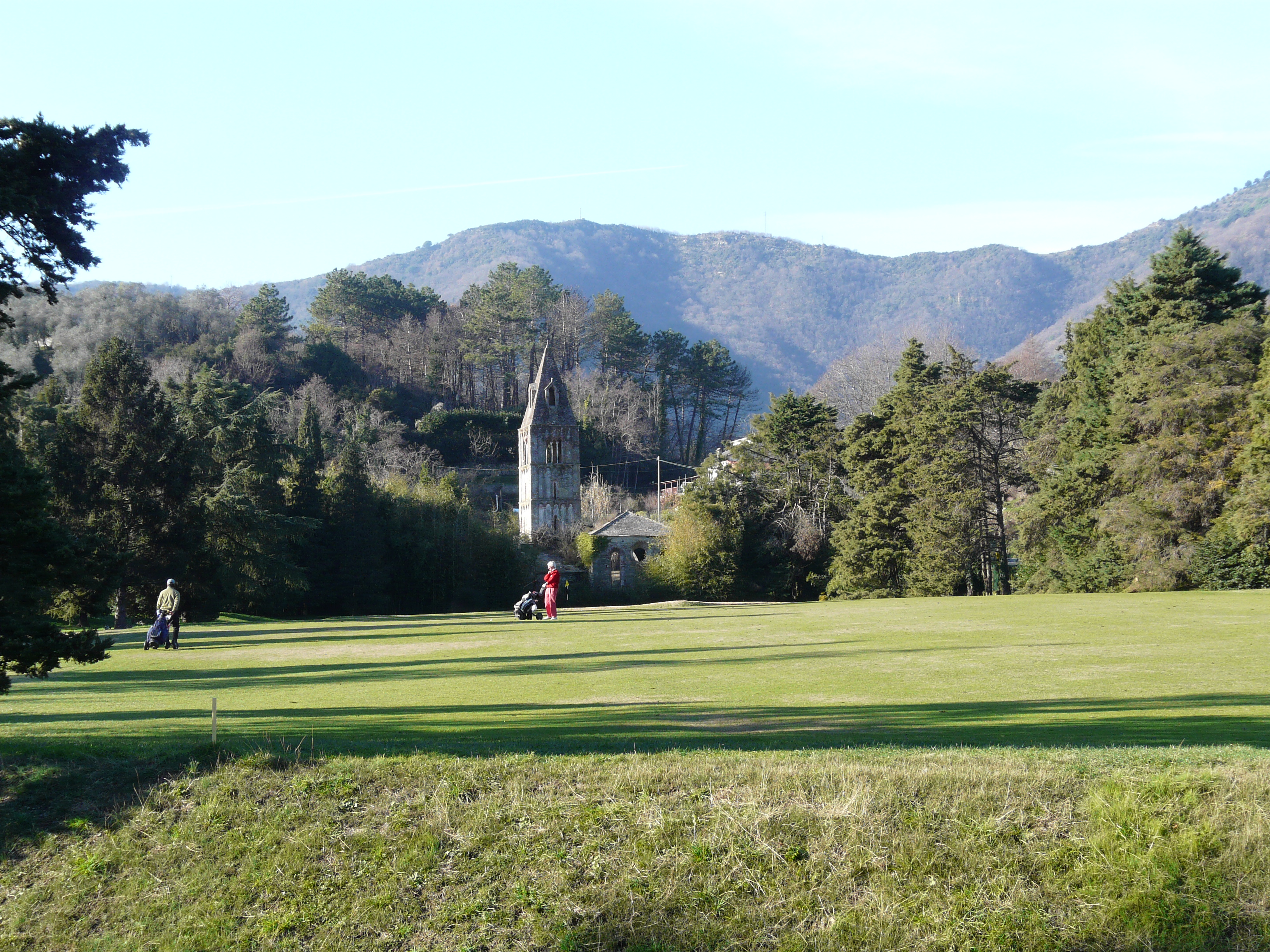 Campo da golf di Rapallo, Liguria, Italia